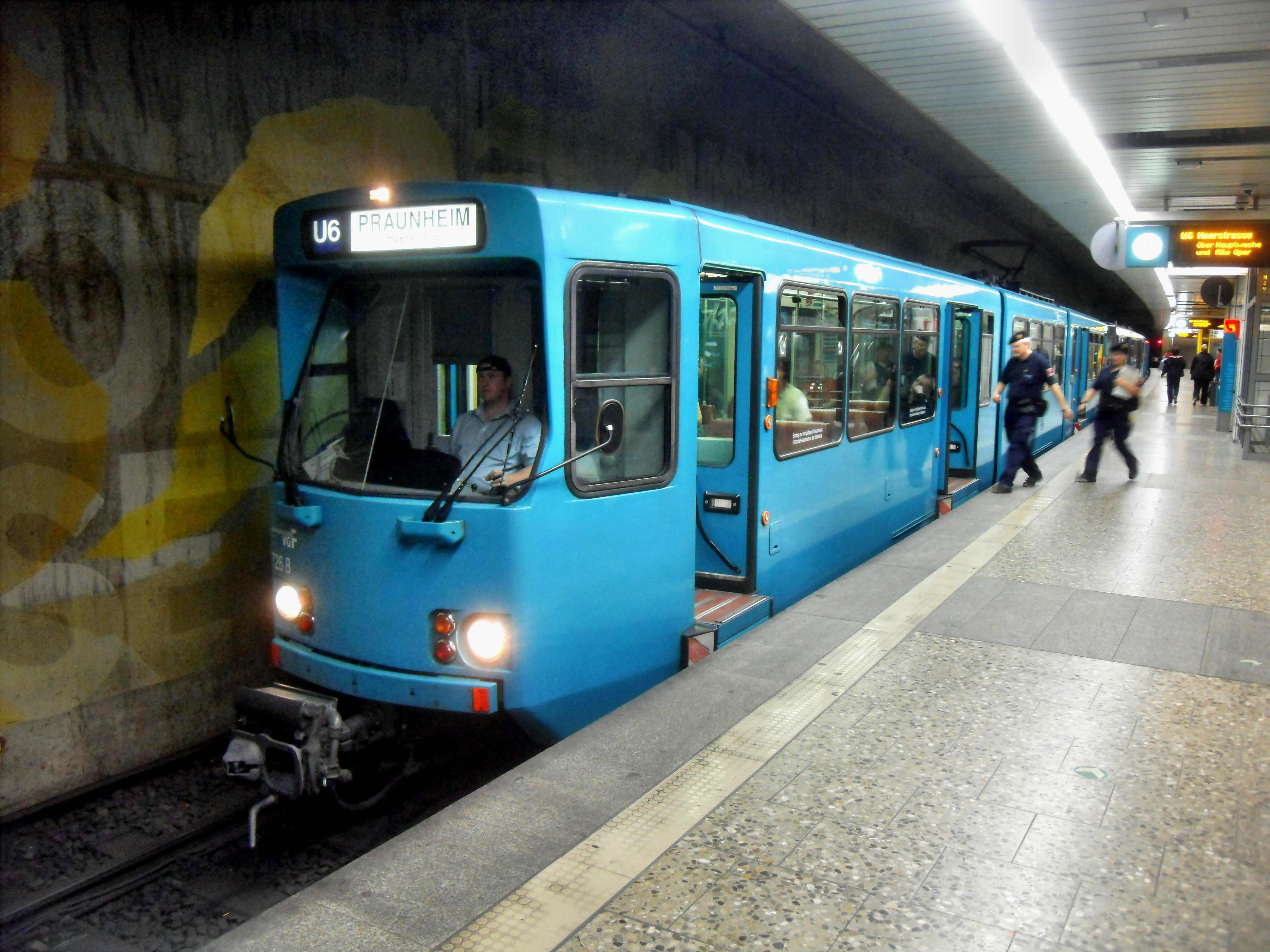 U-Bahn-Wagen des Types Ptb der U-Bahn Frankfurt am Main im Bahnhof Frankfurt (Main) Konstablerwache auf der Linie U 6 auf dem Weg nach Praunheim